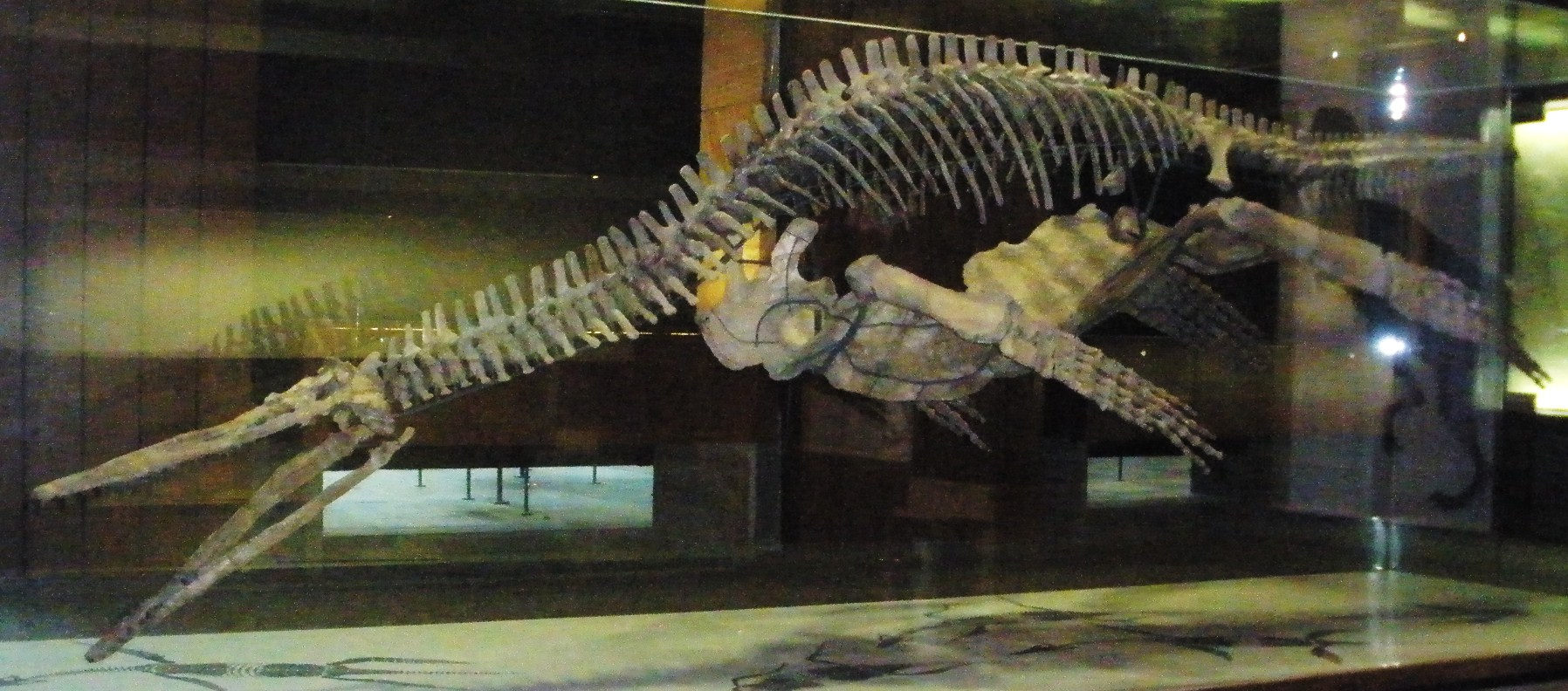 Fossil of Peloneustes, an extinct pliosaur- Took the photo at Senckenberg Museum of Frankfurt